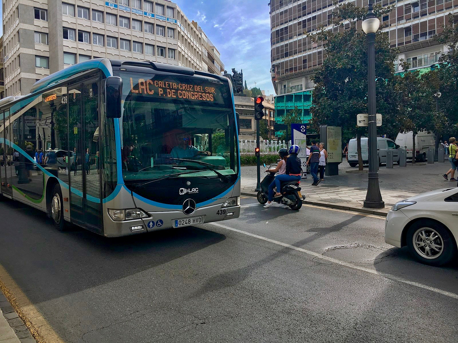 Línea de Alta Capacidad de Granada (LAC) dando servicio cerca de la plaza de Isabel la Católica.